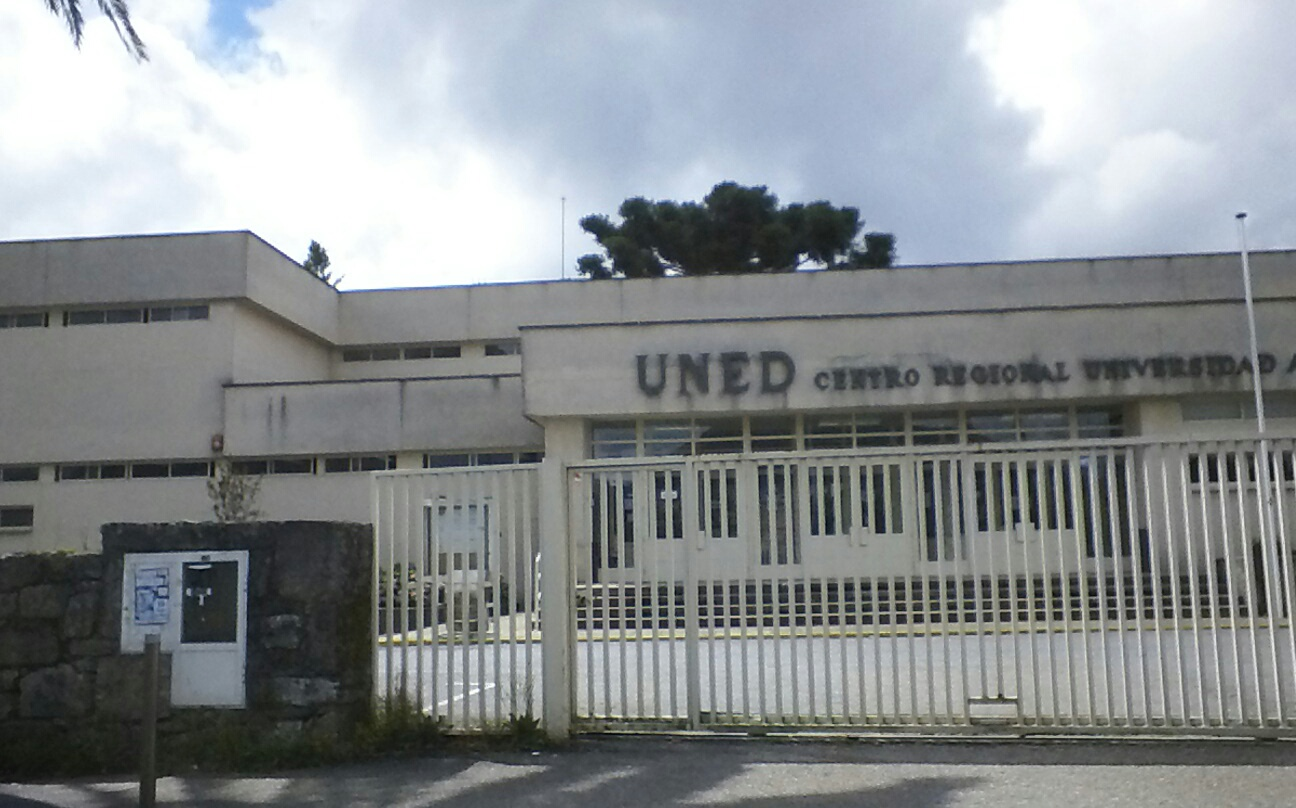 Centro Regional de la UNED en Pontevedra capital